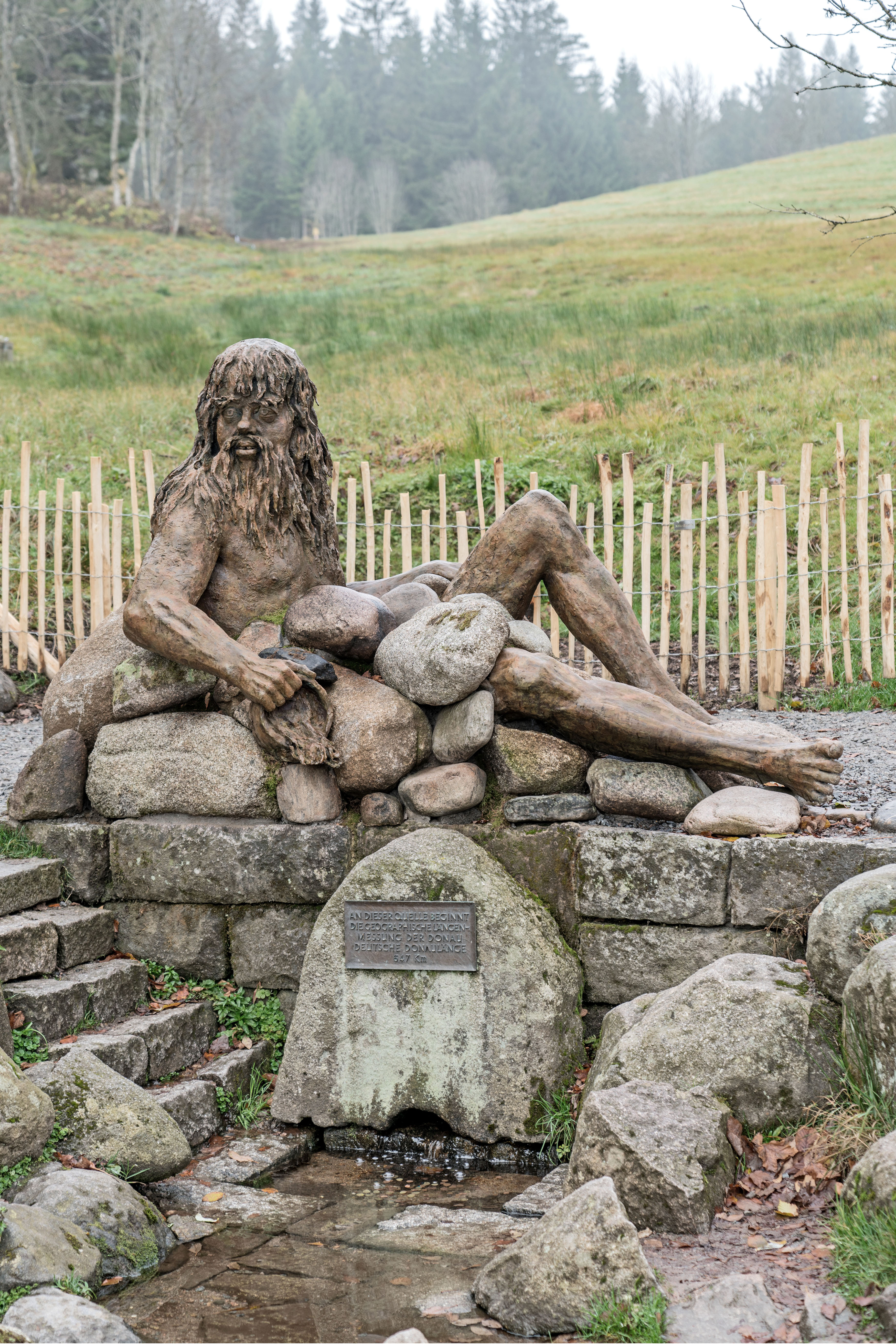 Bregquelle (Donauursprung) bei Furtwangen mit Danuviusfigur von Bildhauer Wolfgang Eckert